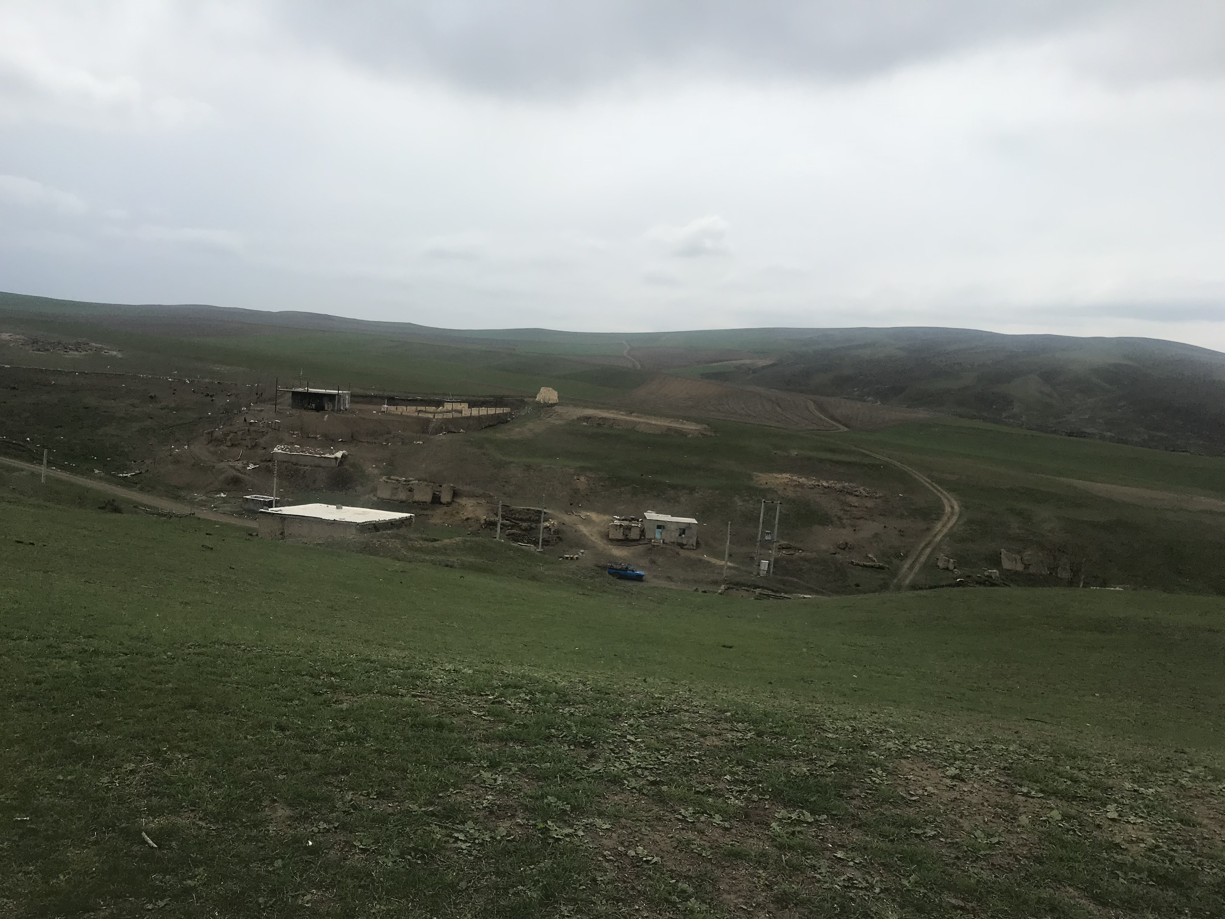 عکس روستا